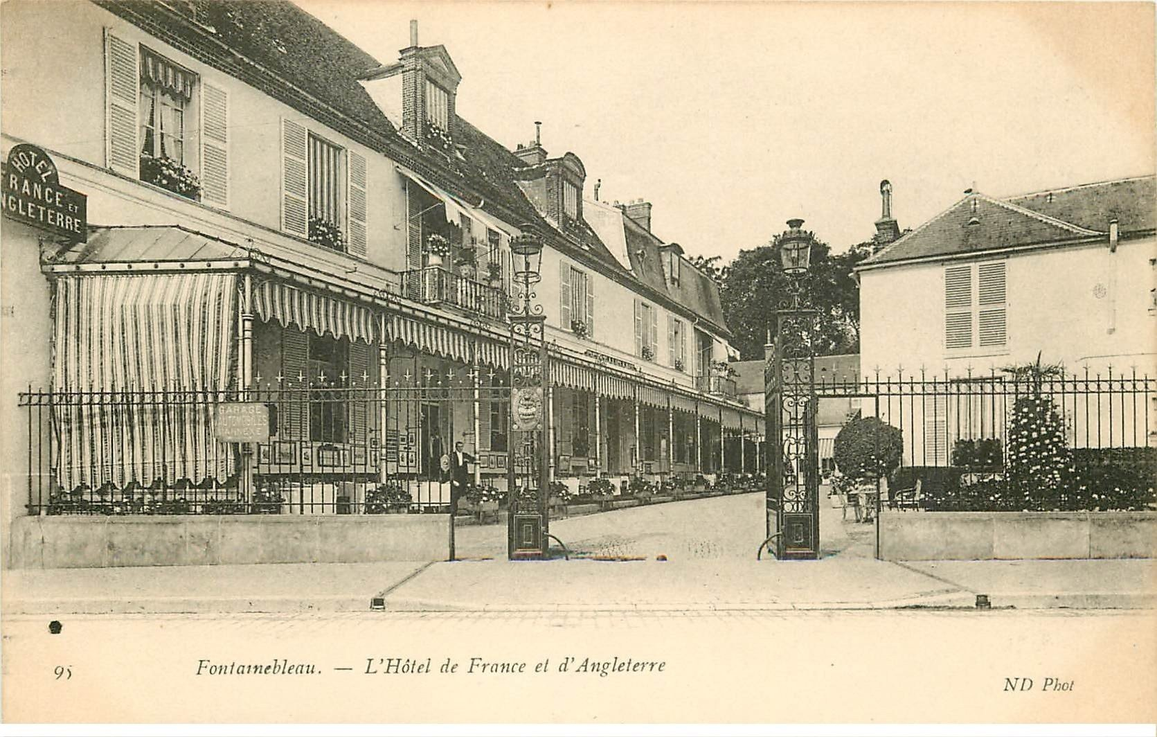 carte postale ancienne